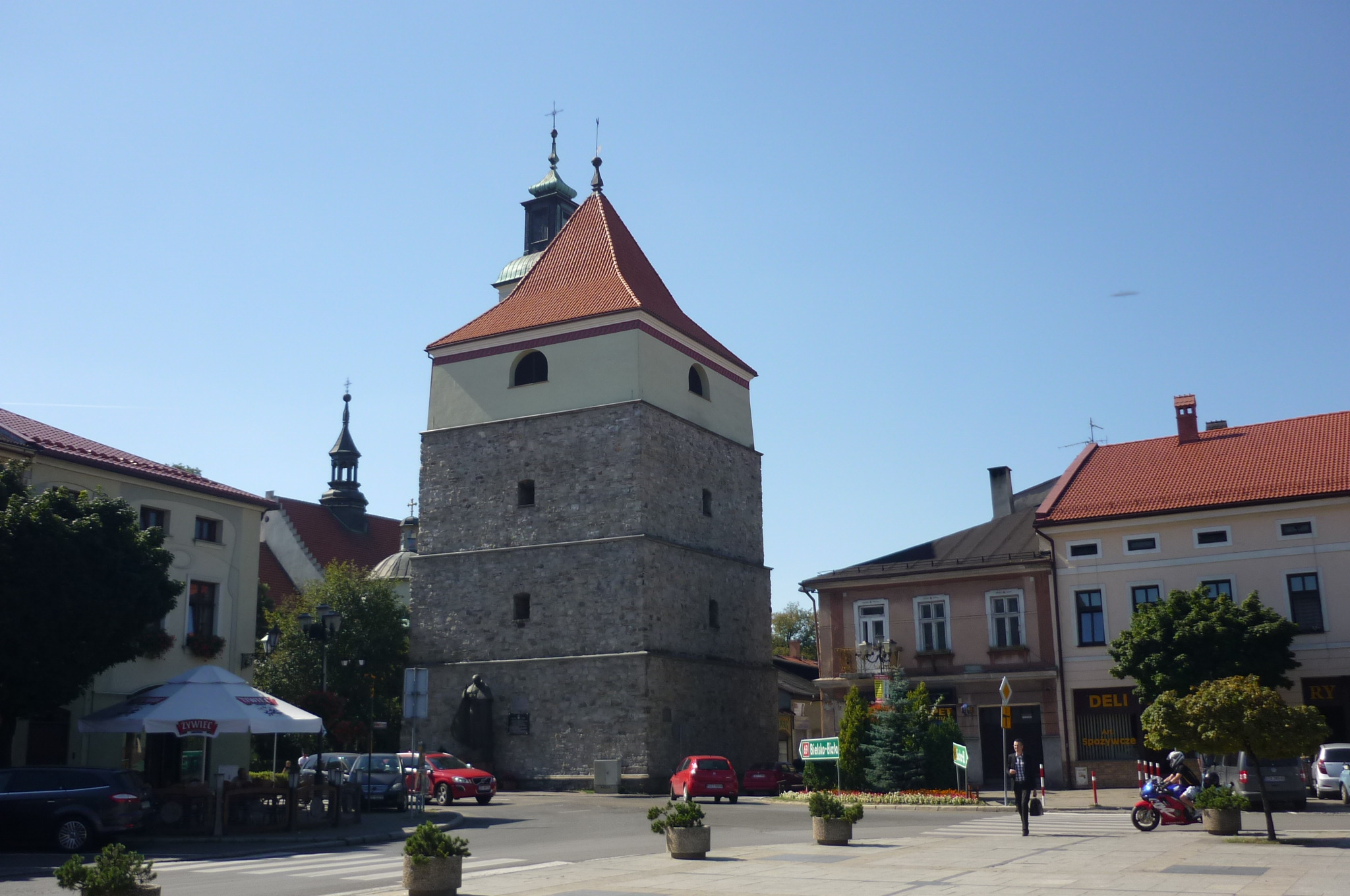 Glockenturm am Markt in Żywiec (Saybusch)